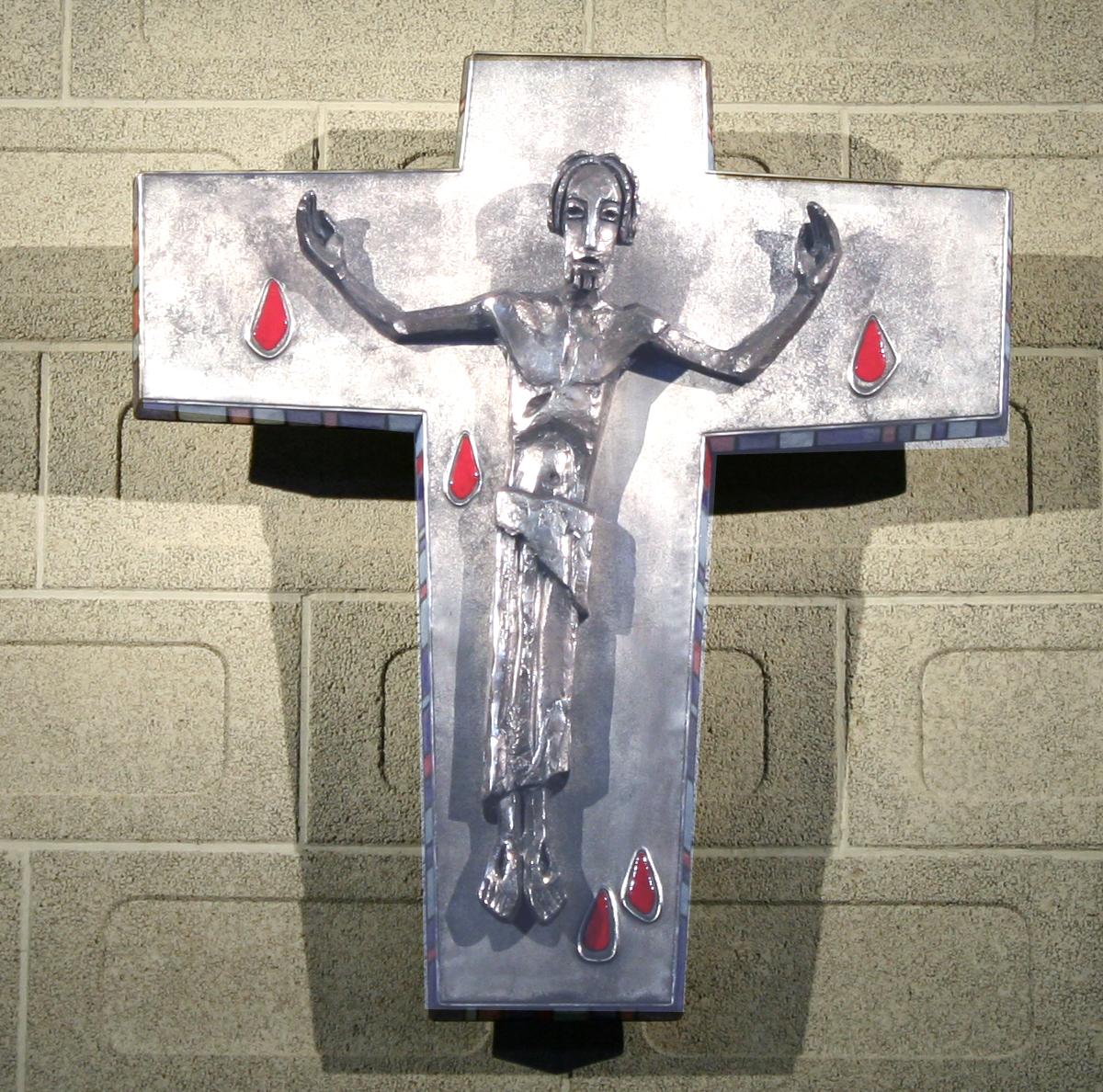 Römisch-katholische Pfarrkirche St. Felix und Regula Zürich-Hard, Kreuz von Albert Schilling